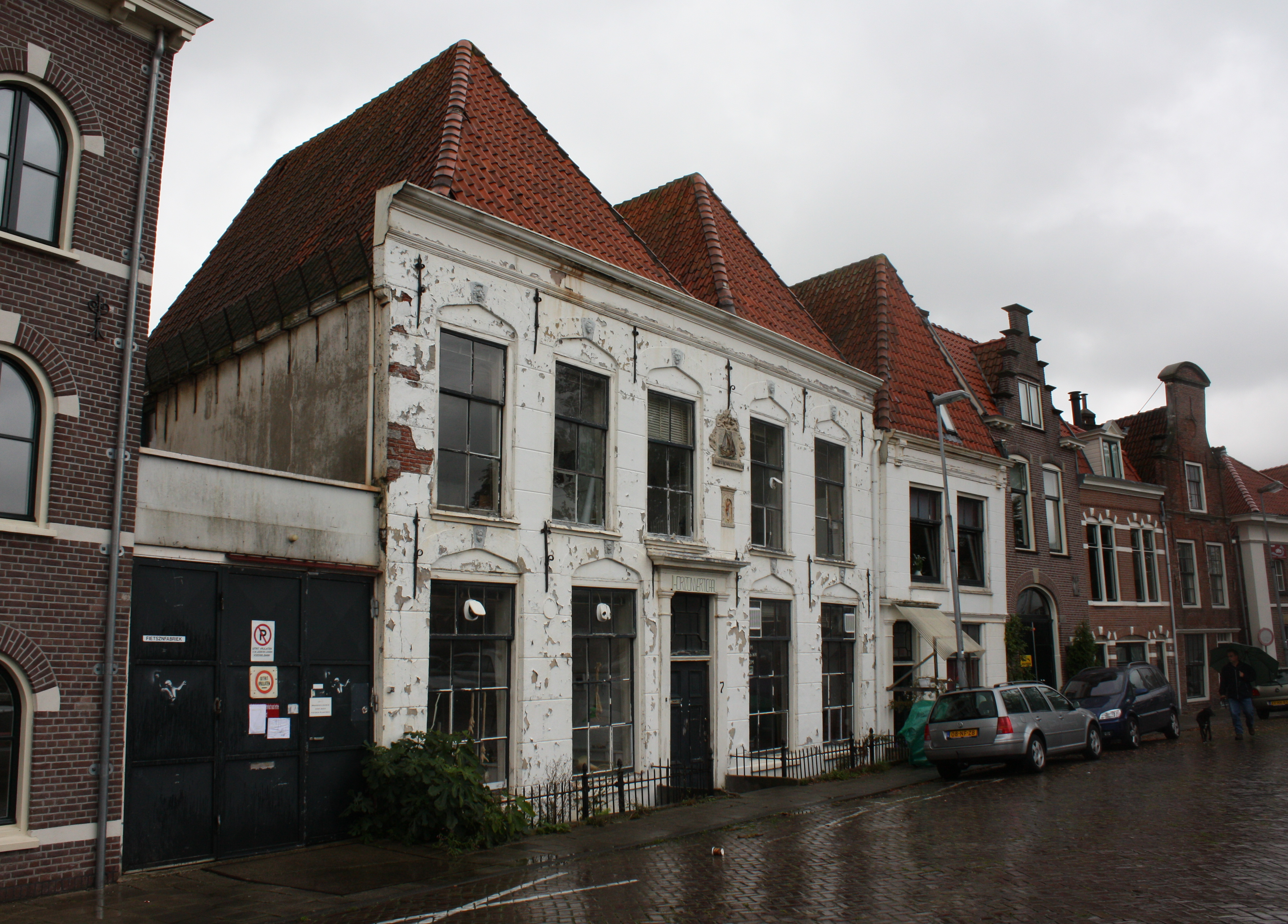 Vroeg 17e-eeuws pand aan de Houtmarkt in Haarlem